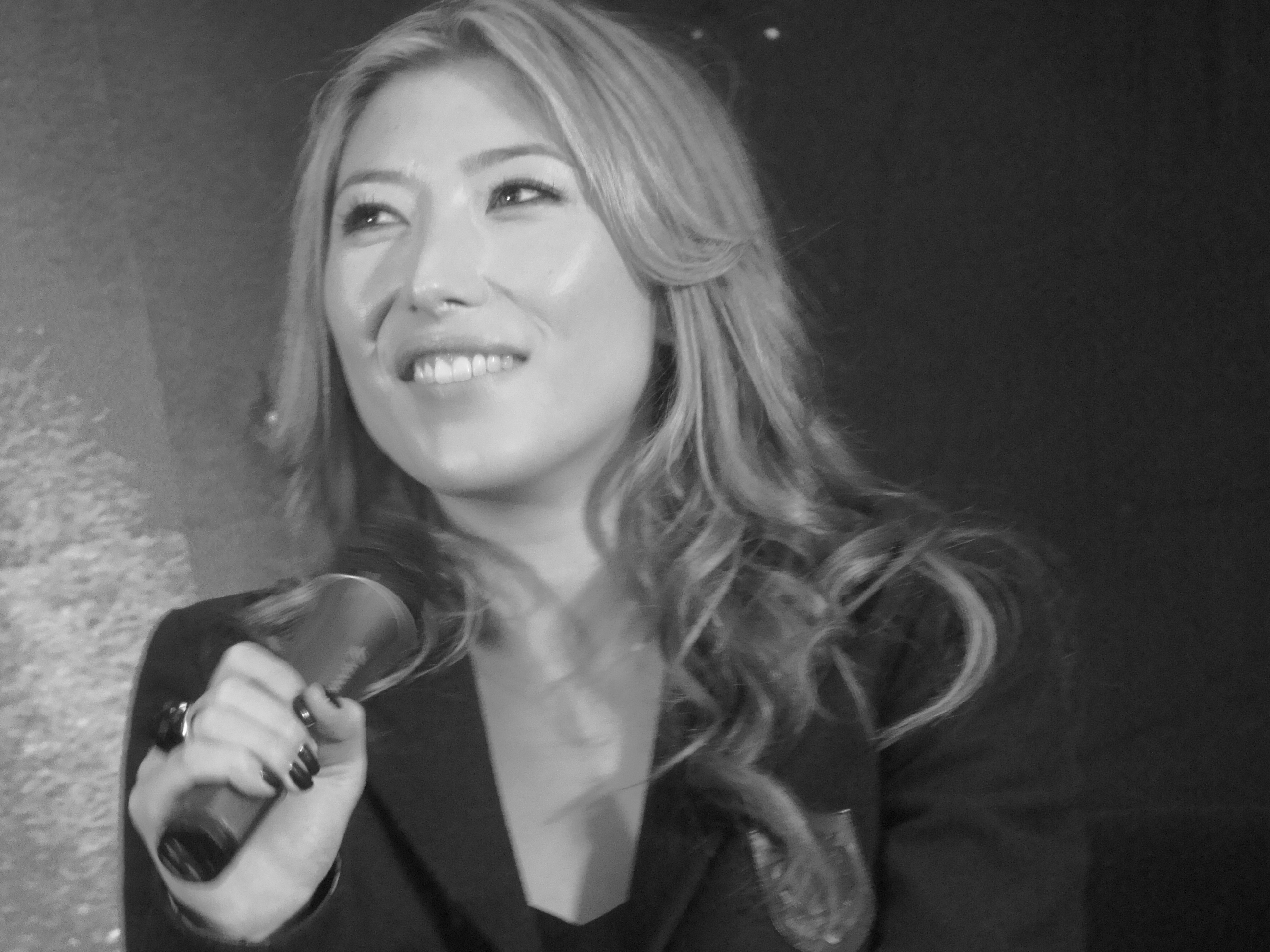 Dichen Lachman